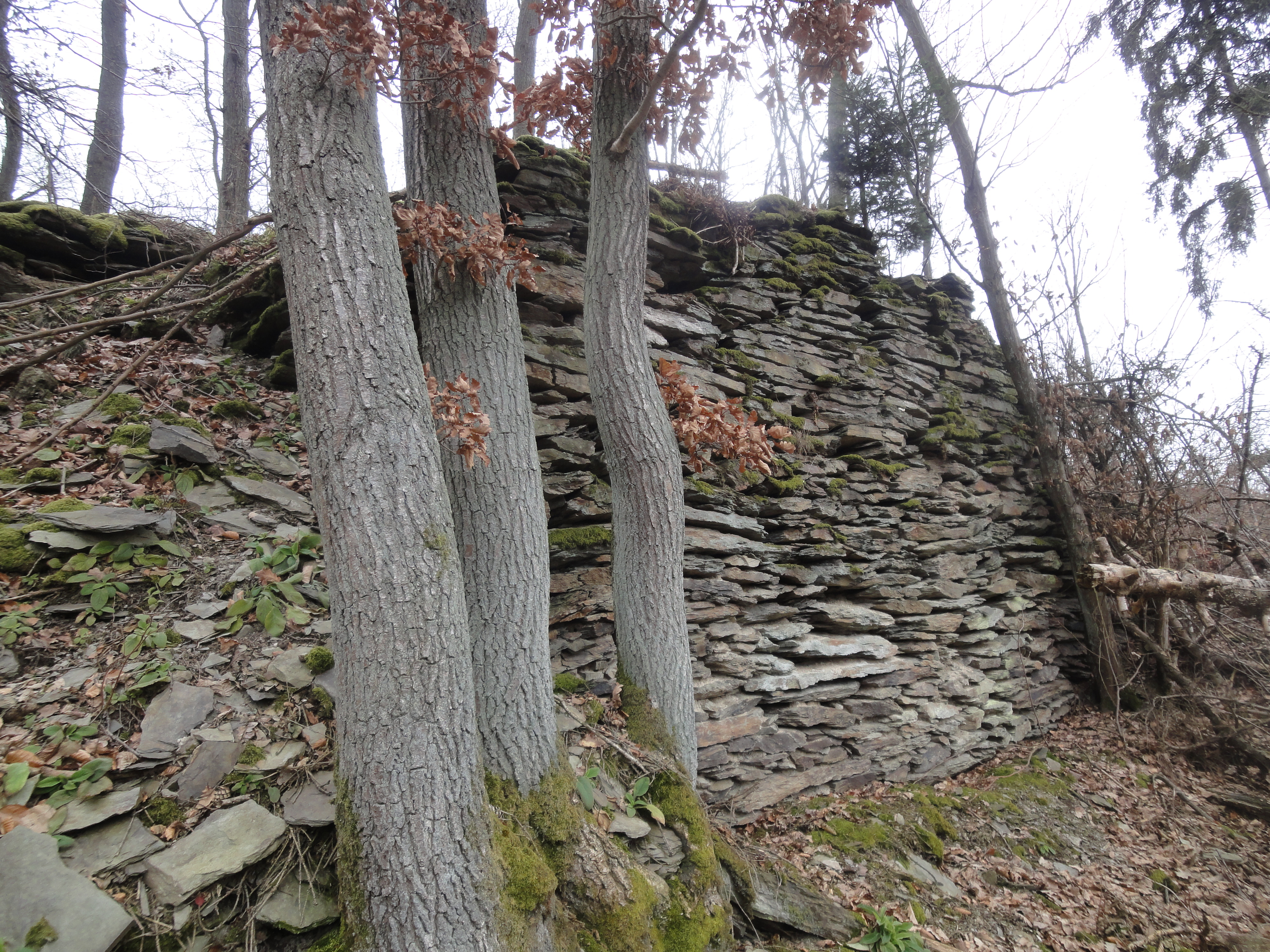 Burg Löpern bei Lipporn